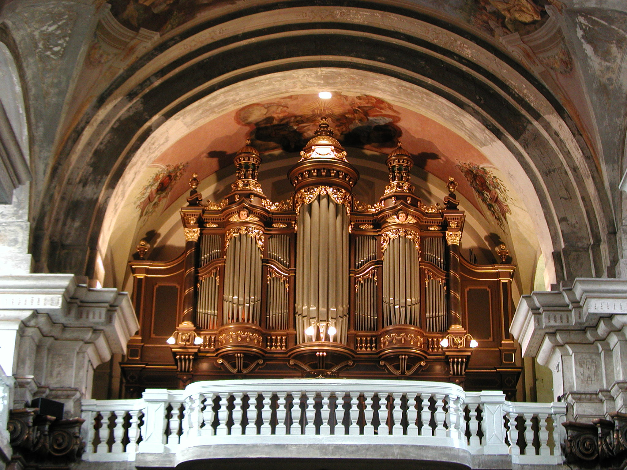 Celkový pohled